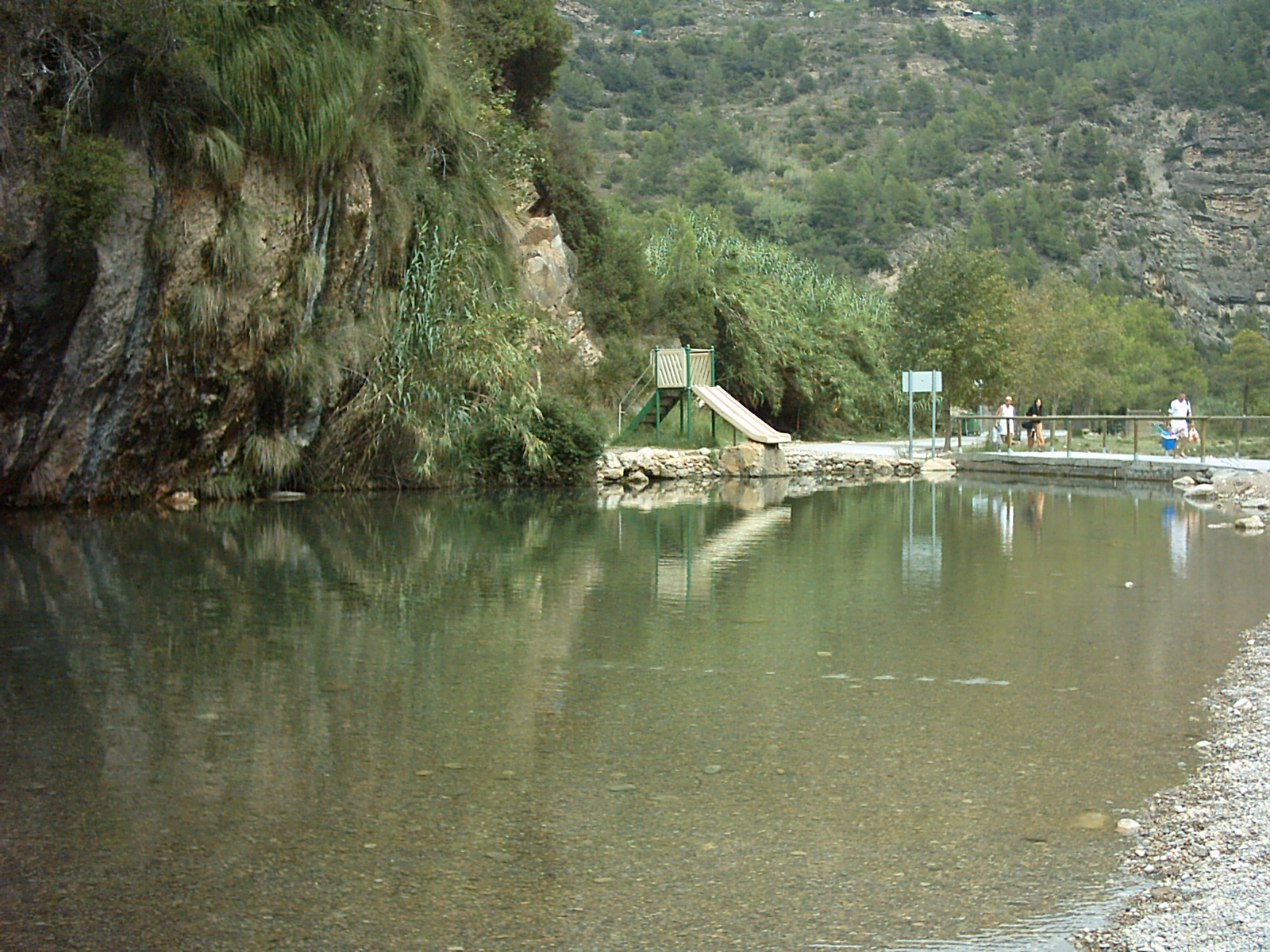 La Fuente de los Baños es un manantial natural del río Mijares a su paso por Montanejos (Castellón), vierte al río un caudal aproximado de unos 6.000 litros por minuto. Su agua fue declarada de utilidad pública por la Real Orden del 13 de octubre de 1863. Por su temperatura constante de 25ºC tiene efectos hipo termales y hace placentero el baño durante todo el año. Además, cuenta con propiedades hidrogeoquímicas y biológicas beneficiosas para la salud. Por su composición química (700 mg/l sulfatado–magnésicas bicarbonatado mixtas) es considerada como oligometálica de mediana mineralización. La fisiografía del cauce en esta zona ha permitido la formación de piscinas naturales que suponen una excelente zona de descanso, que se encuentra acondicionada con merenderos y juegos infantiles.